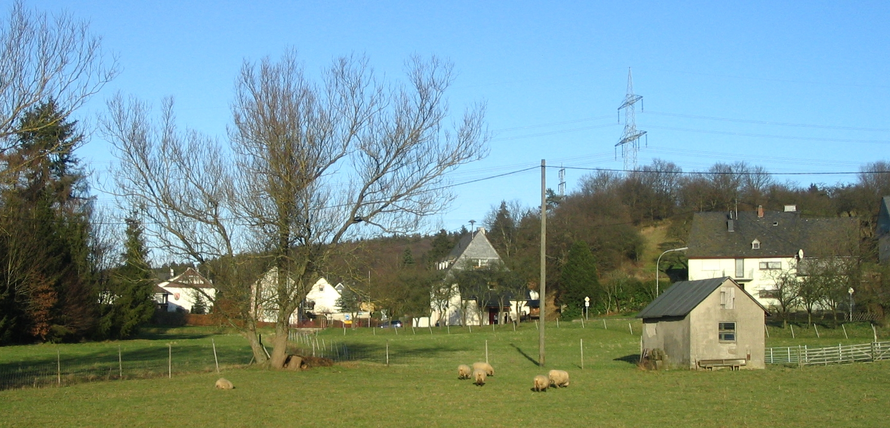 Erbach im Hunsrück aus westlicher Richtung